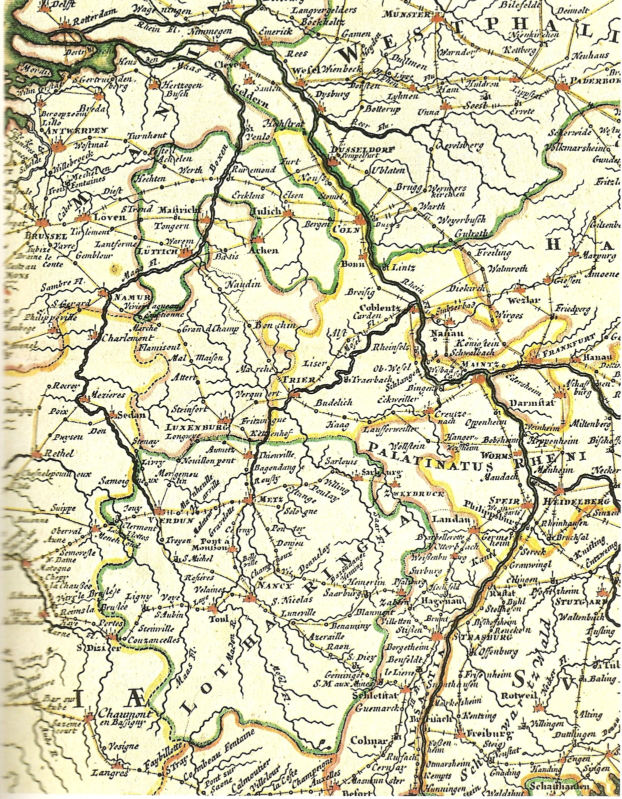 Poststraßenkarte von J. P. Nell 1708, verbessert 1714, Ausschnitt